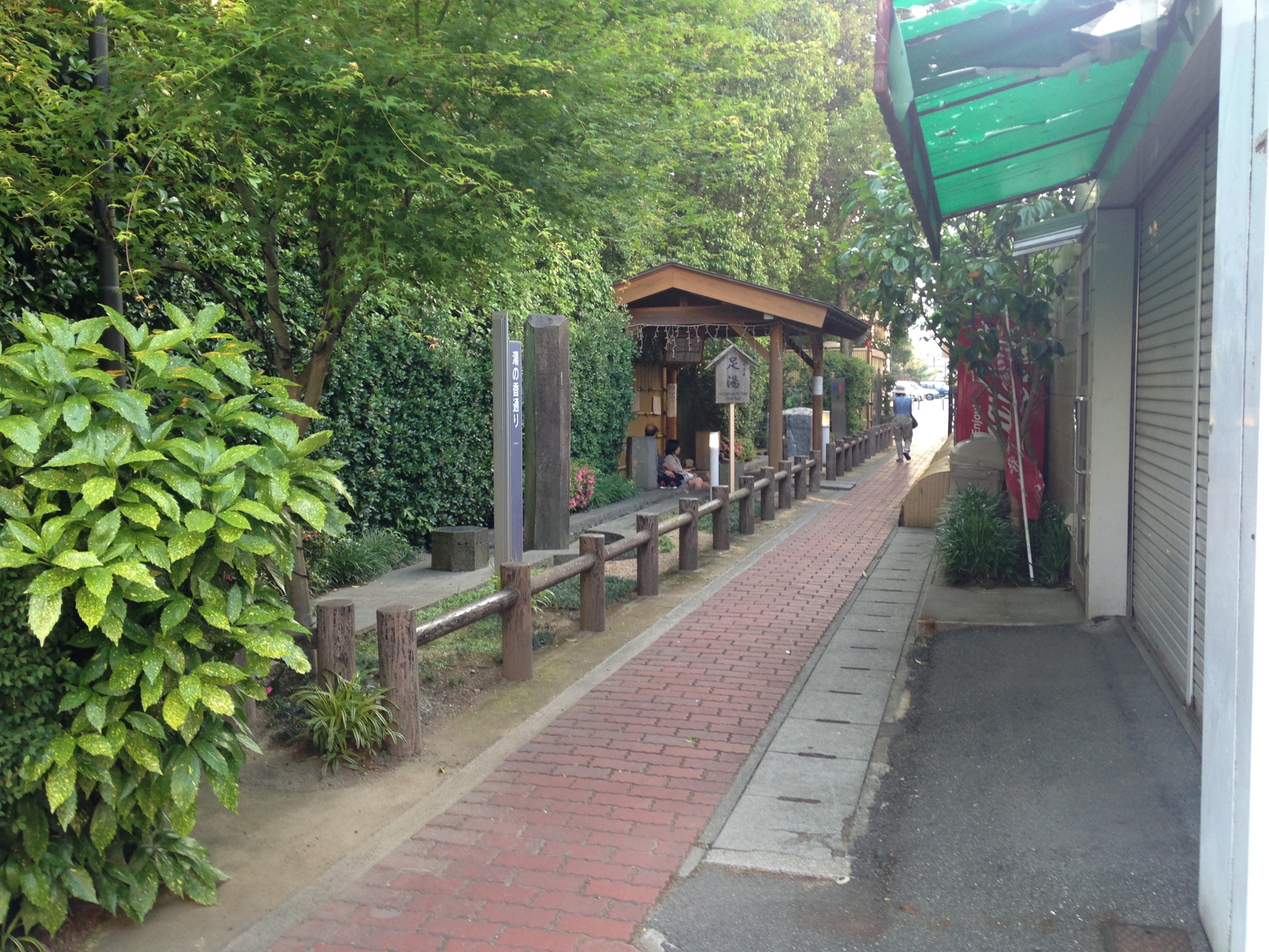 湯田温泉街の湯の香通りと足湯